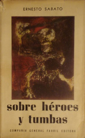 Primera edición de la novela Sobre héroes y tumbas (1961).